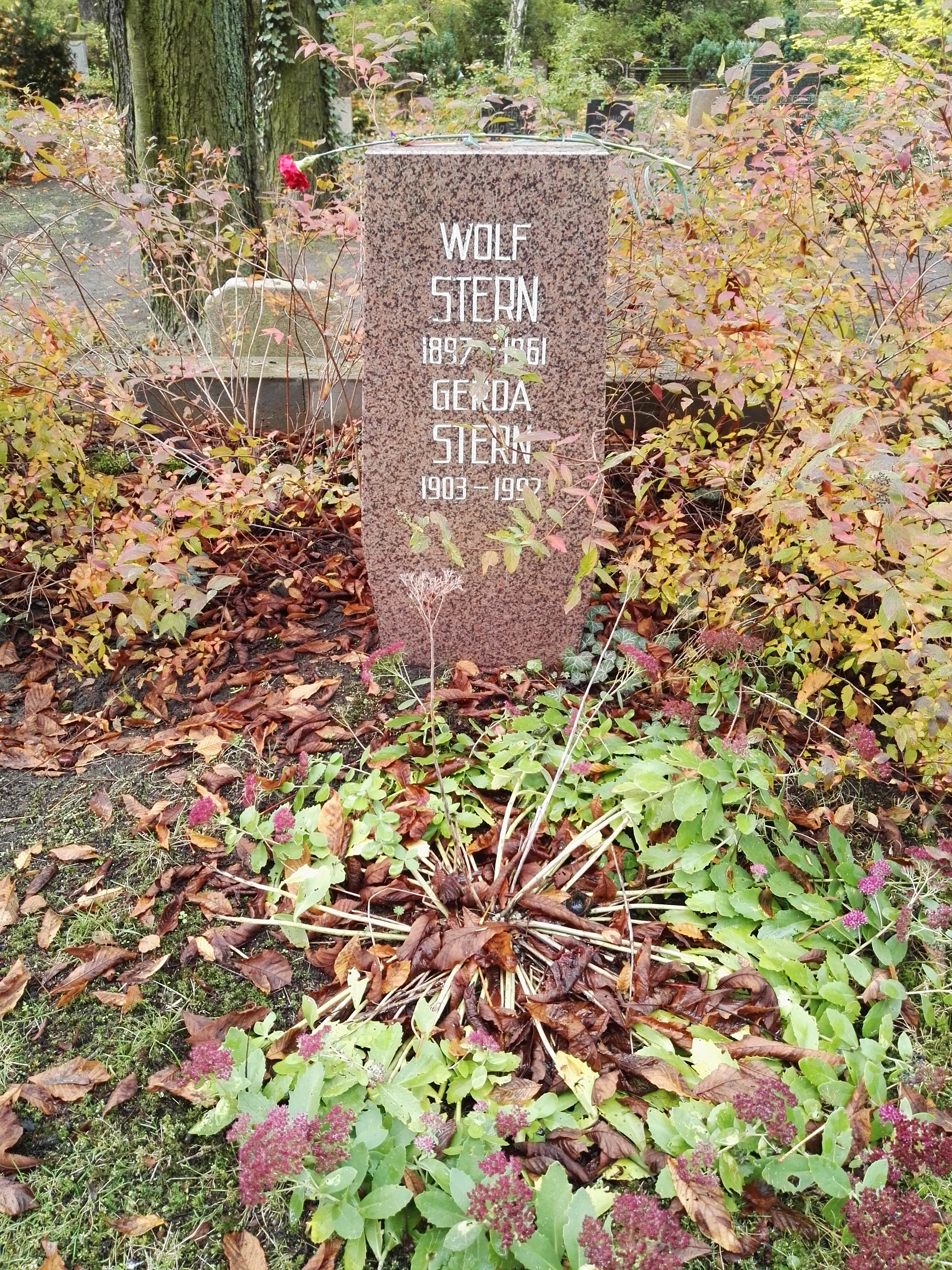 Grab von Gerda Stern und Wolf Stern auf dem Sozialistenfriedhof des Zentralfriedhofs Friedrichsfelde